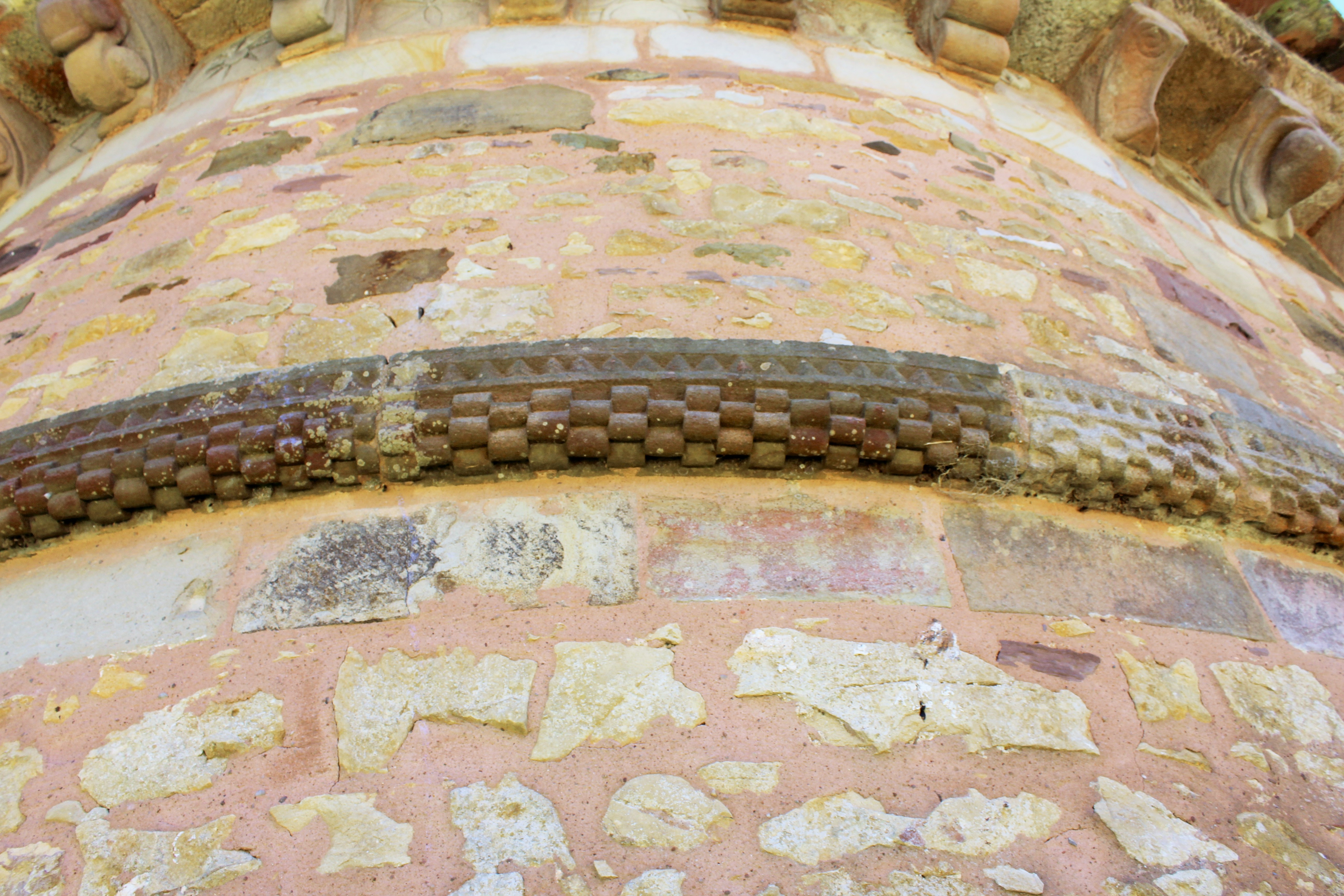 Guardapolvo taqueado jaqués